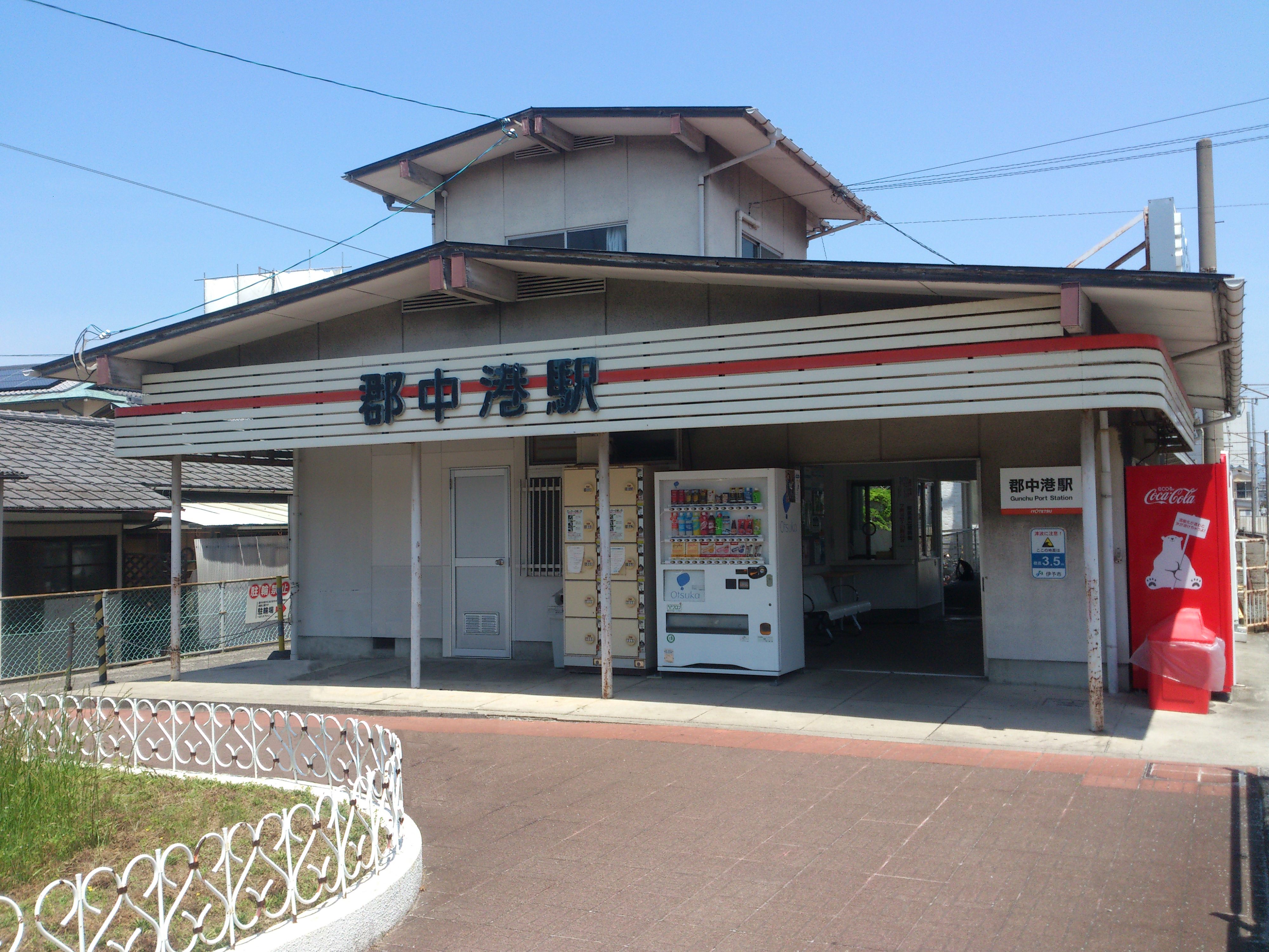 伊予鉄道、郡中港駅です。